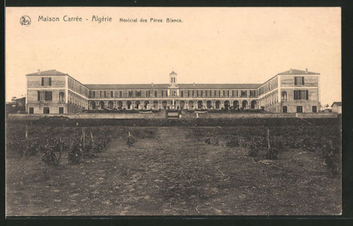 Noviciat des Pères blancs à Maison-Carrée près d'Alger. CPA du début du XXe siècle.